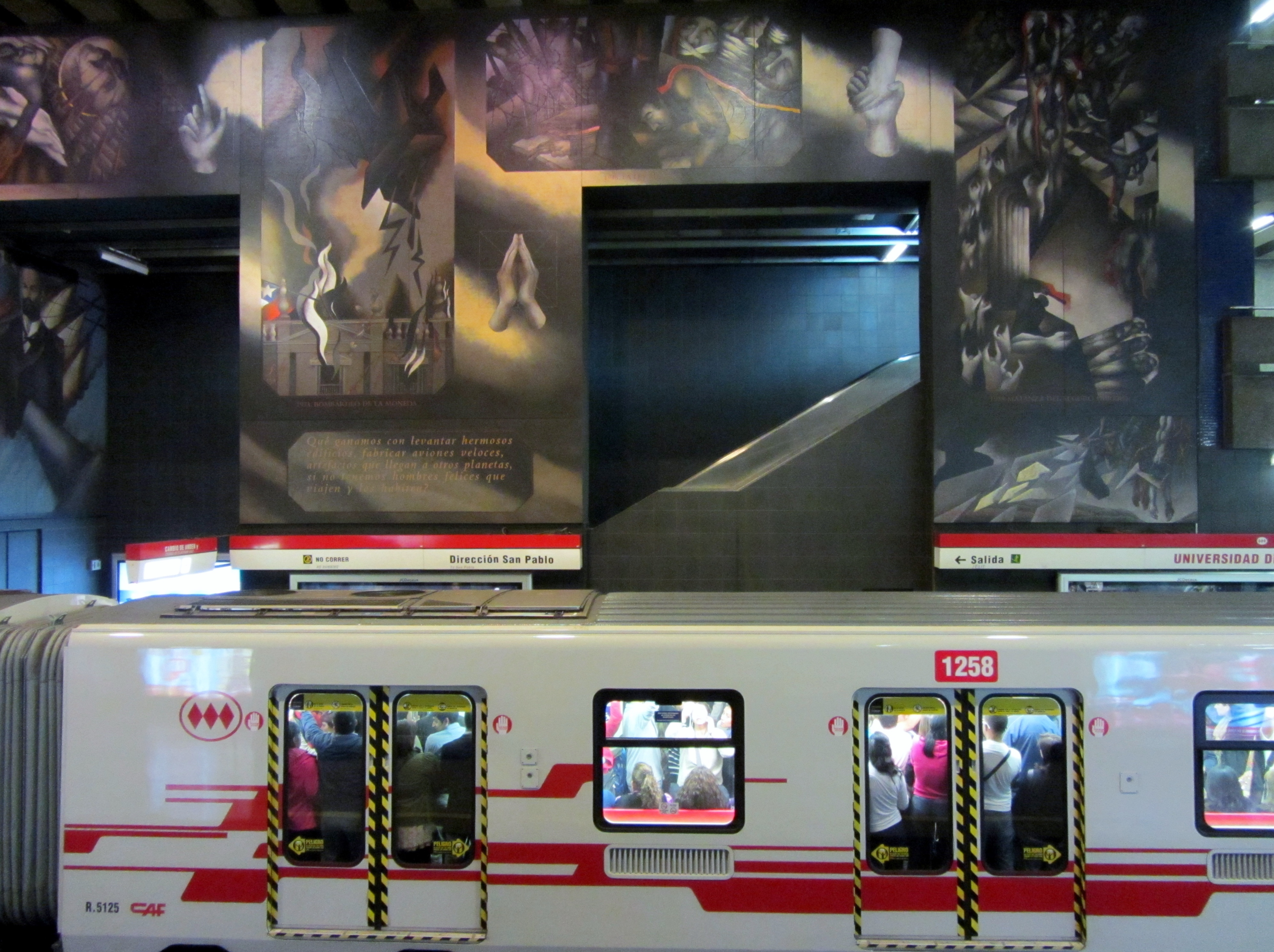 Los conflictos, mural del pintor chileno Mario Toral que forma parte de la gran obra titulada Memoria visual de una nación, metro Universidad de Chile, en Santiago de Chile. Está en el norponiente de la estación.